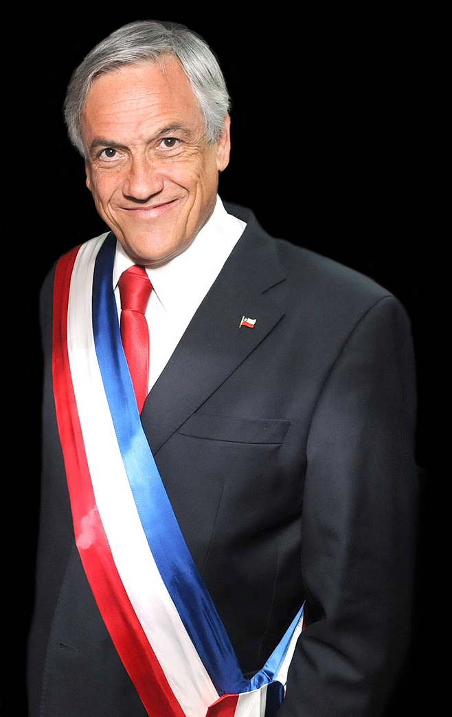 El Mandatario presenció acompañado de ministros y autoridades la Revista Naval Bicentenario a bordo del Buque Escuela Esmeralda. En la oportunidad destacó la presentación, felicitando a las Fuerzas Armadas y Aérea “por la magnífica y formidable demostración de profesionalismo, de amor por la patria y de compromiso con su misión que hoy día hemos podido presenciar.